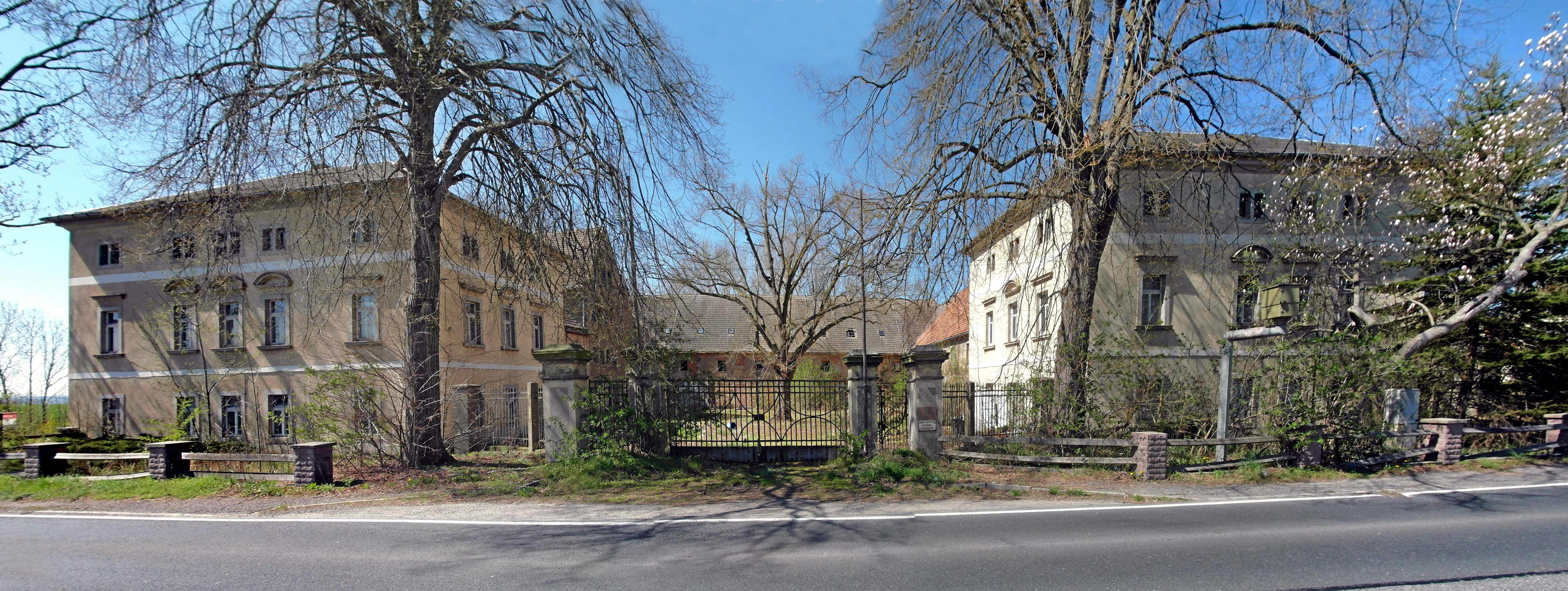 20.04.2015 01683 Katzenberg (zu Nossen): Freigut Katzenberg (1890-1895) von Süden, Katzenberg 1 (GMP: 51.093018,13.355362) [SAM9939+9941+9942.JPG]20150420610MDR.JPG(c)Blobelt